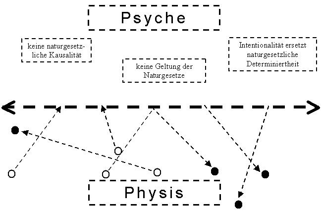 Jonas Subjektivität Modellbildung Schema